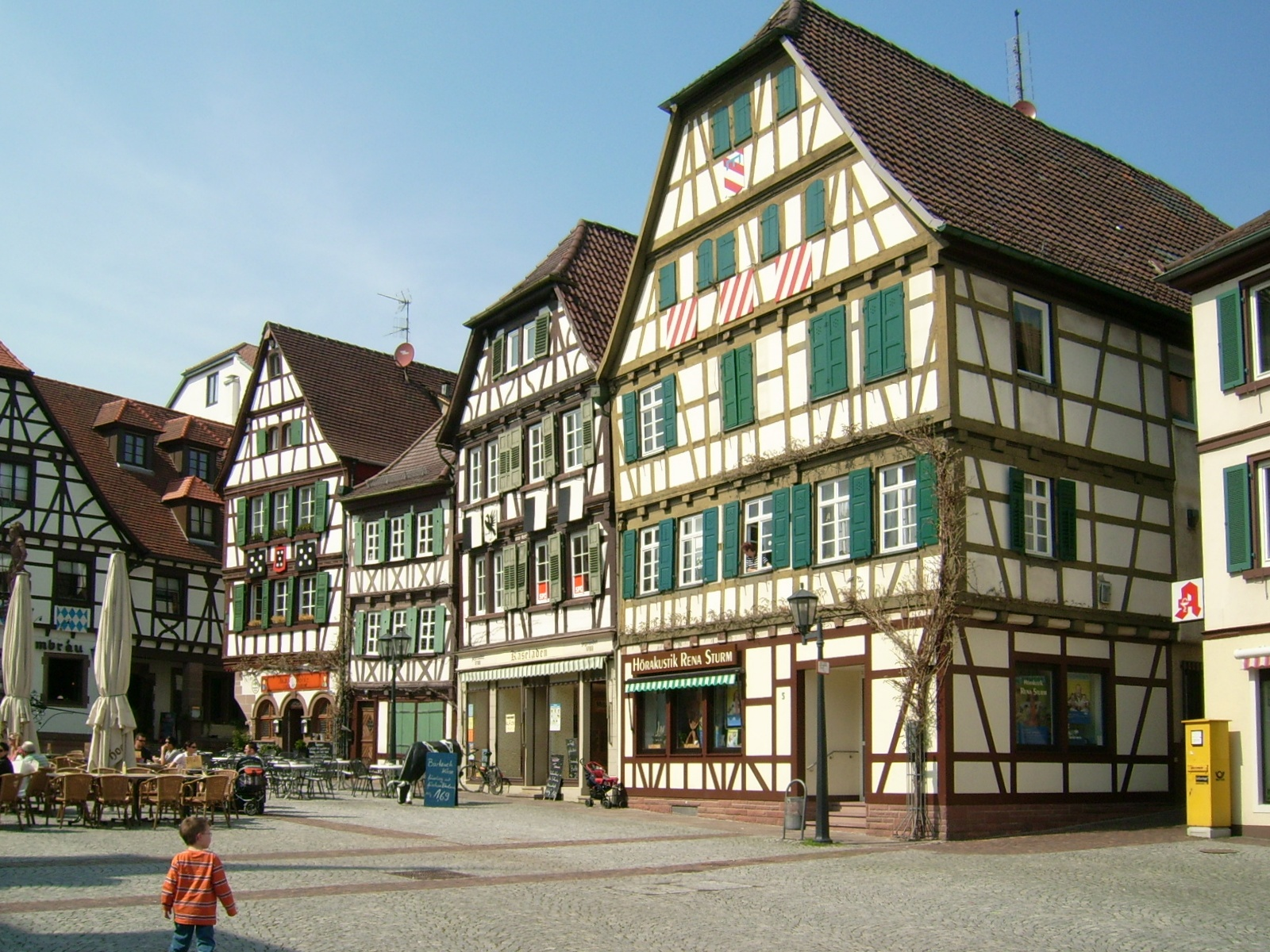 Bildbeschreibung: Marktplatz Bretten Quelle: selbst fotografiert Fotograf: Kolling Datum: siehe Metadaten